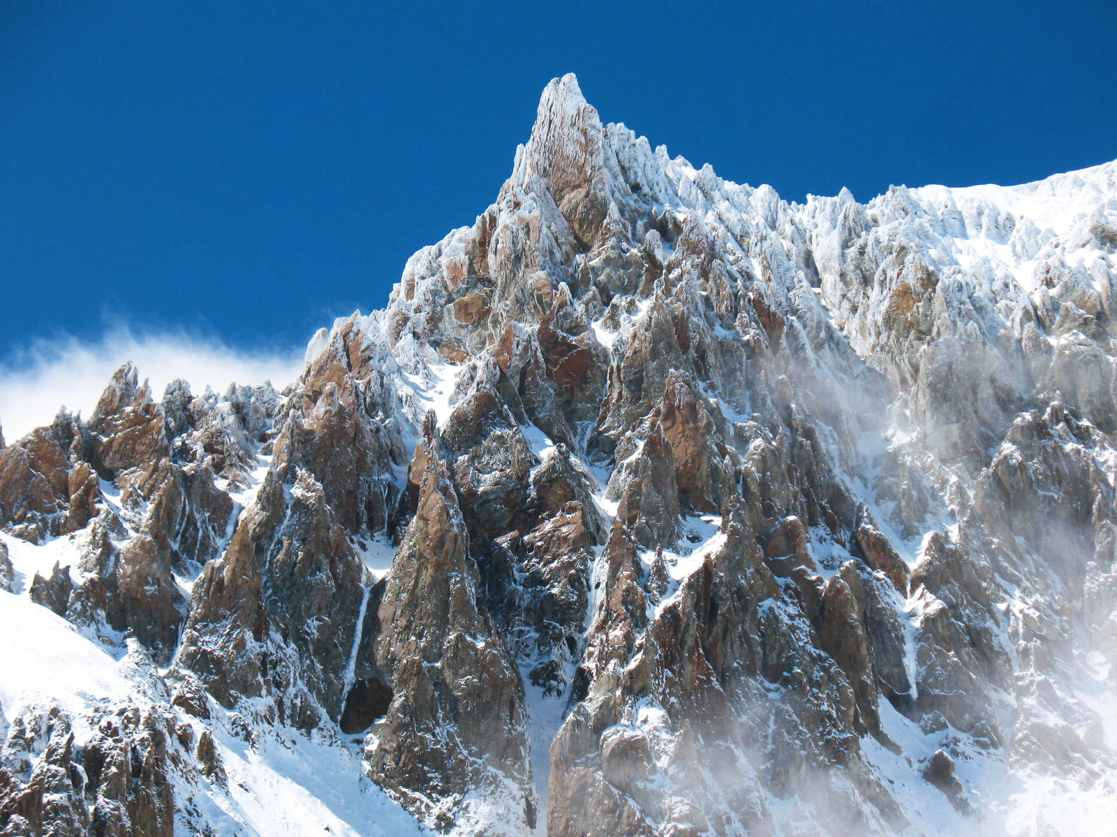 Espectacular promontorio del cerro San Lorenzo.